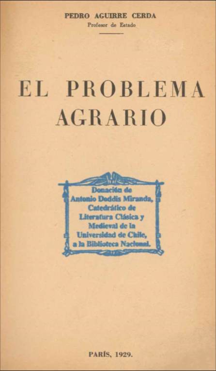 Portada del libro "El problema agrario" de Pedro Aguirre Cerda